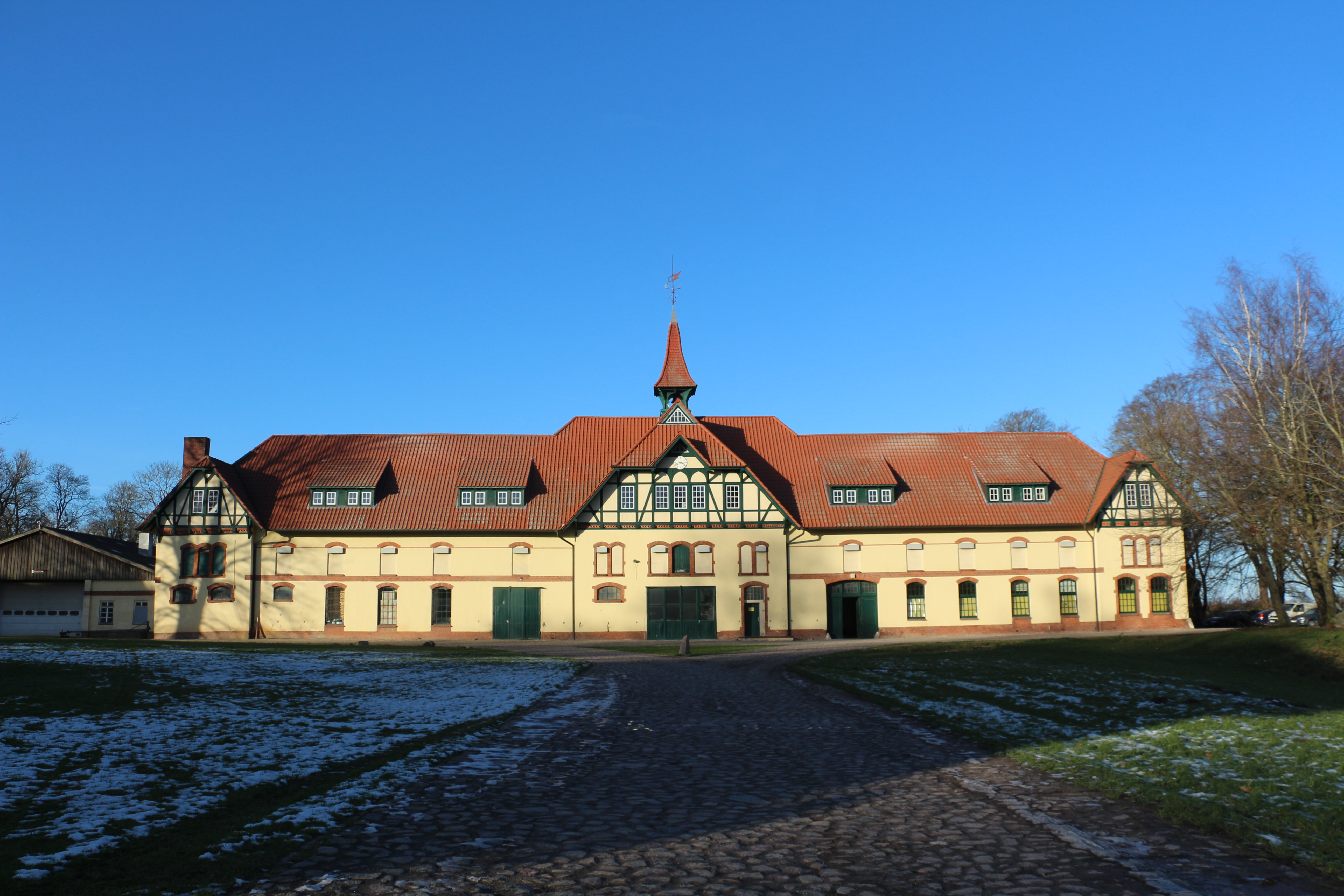 Kuhhaus des Guts Warleberg / Neuwittenbek